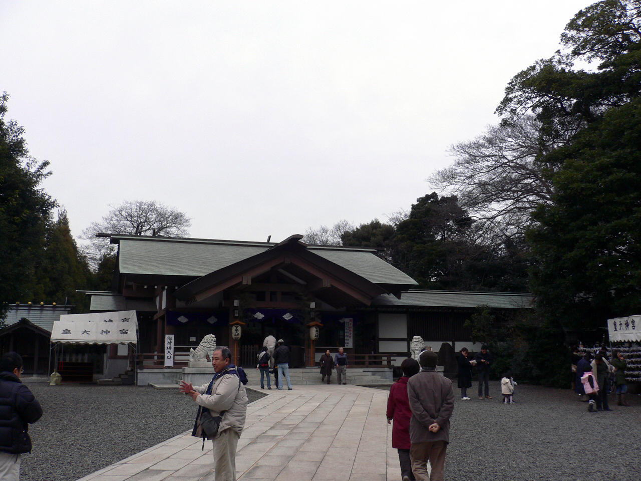 鵠沼皇大神宮の拝殿。